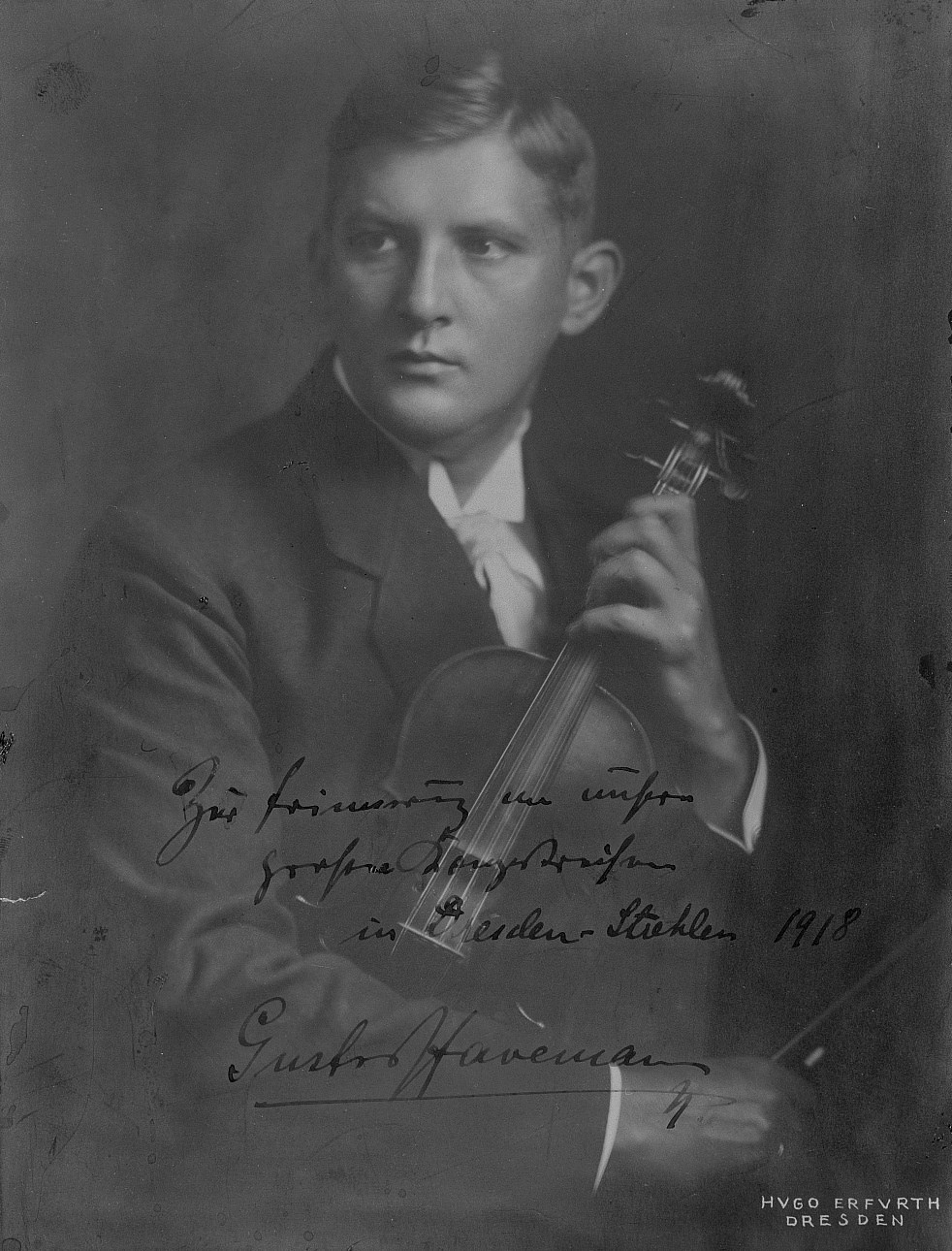 Der Geiger und Komponist Gustav Havemann. Fotografie (Weltpostkarte mit Widmung) von Hugo Erfurth, um 1915